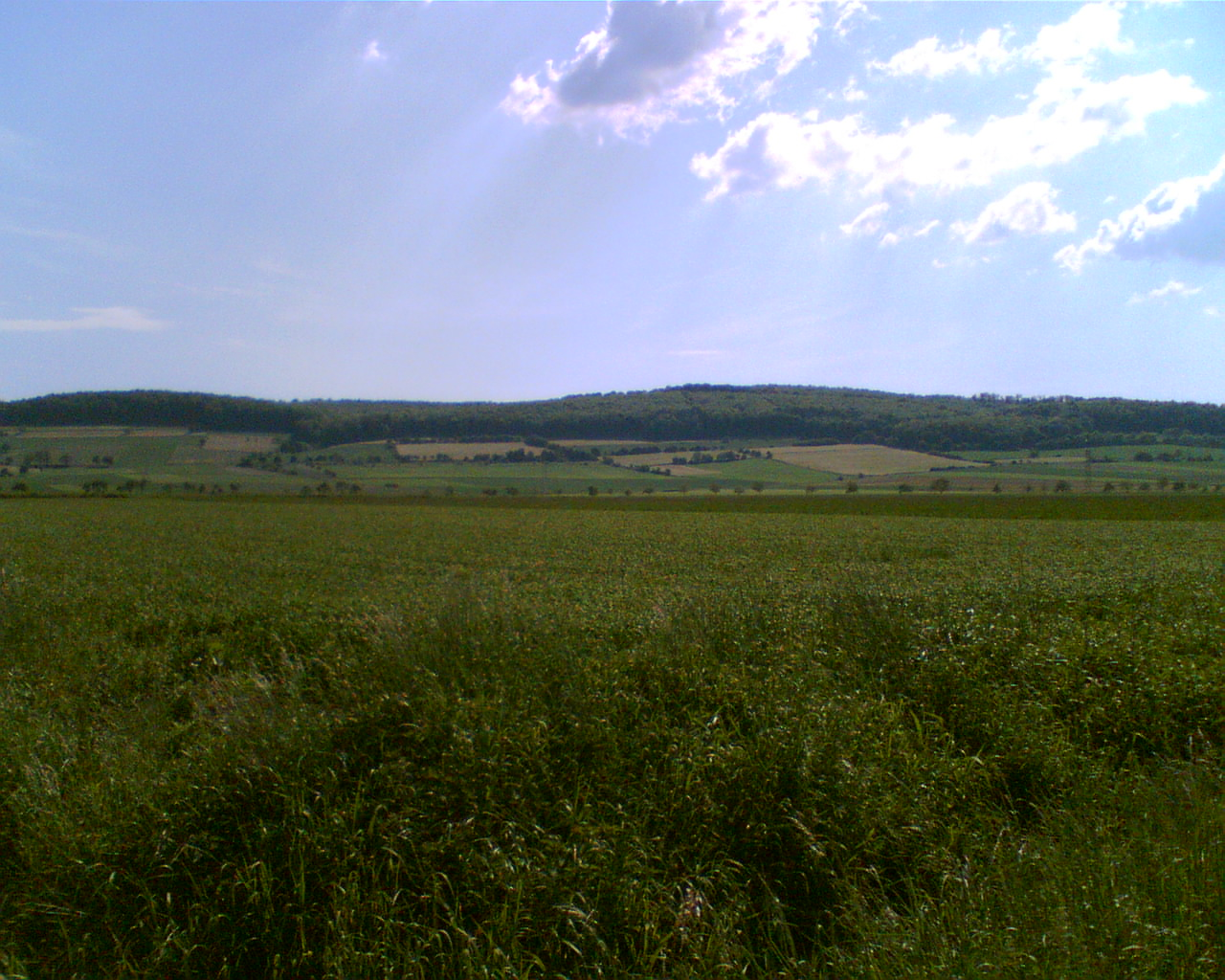 Höhenzug Ahlsburg, nordöstliche Seite